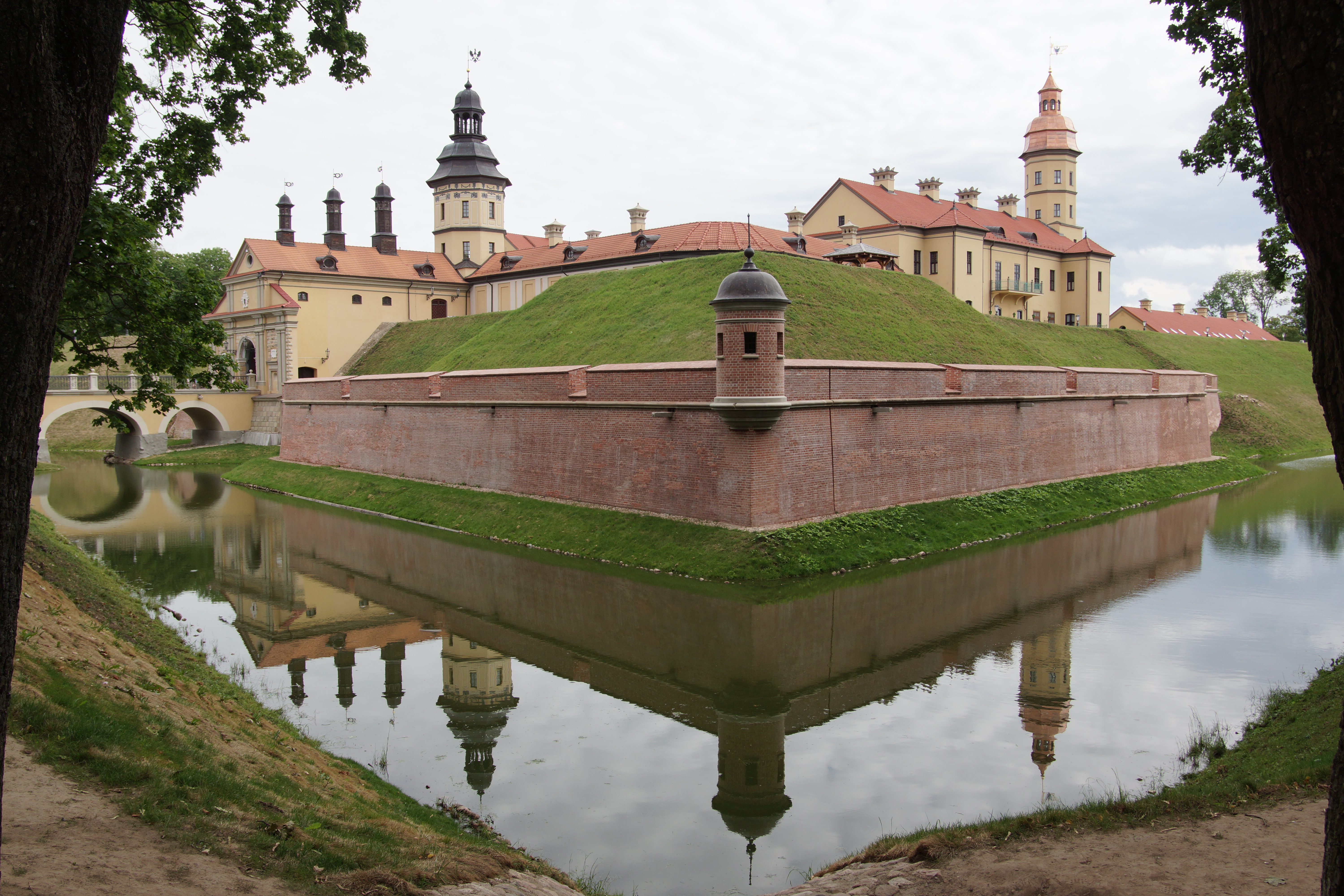 Беларуская (тарашкевіца): Палацава-паркавы ансамбль:замак-палац, паўднёвая і ўсходняя галерэі, камяніца, арсэнал з капліцай, брама, два прыбрамныя корпусы, паўночна-ўсходняя і паўднёва-заходняя галерэі, лядоўня, стайня;абарончыя збудаваньні і мост;тэрыторыя паркаў:Замкавы, Стары, Японскі, Ангельскі, Новы;водная сыстэма:Дзікі, Замкавы, Бэрнардынскі ставы. г. Нясьвіж This is a photo of Belarusian heritage monument. Reference number: 610Г000466 ( WLM)